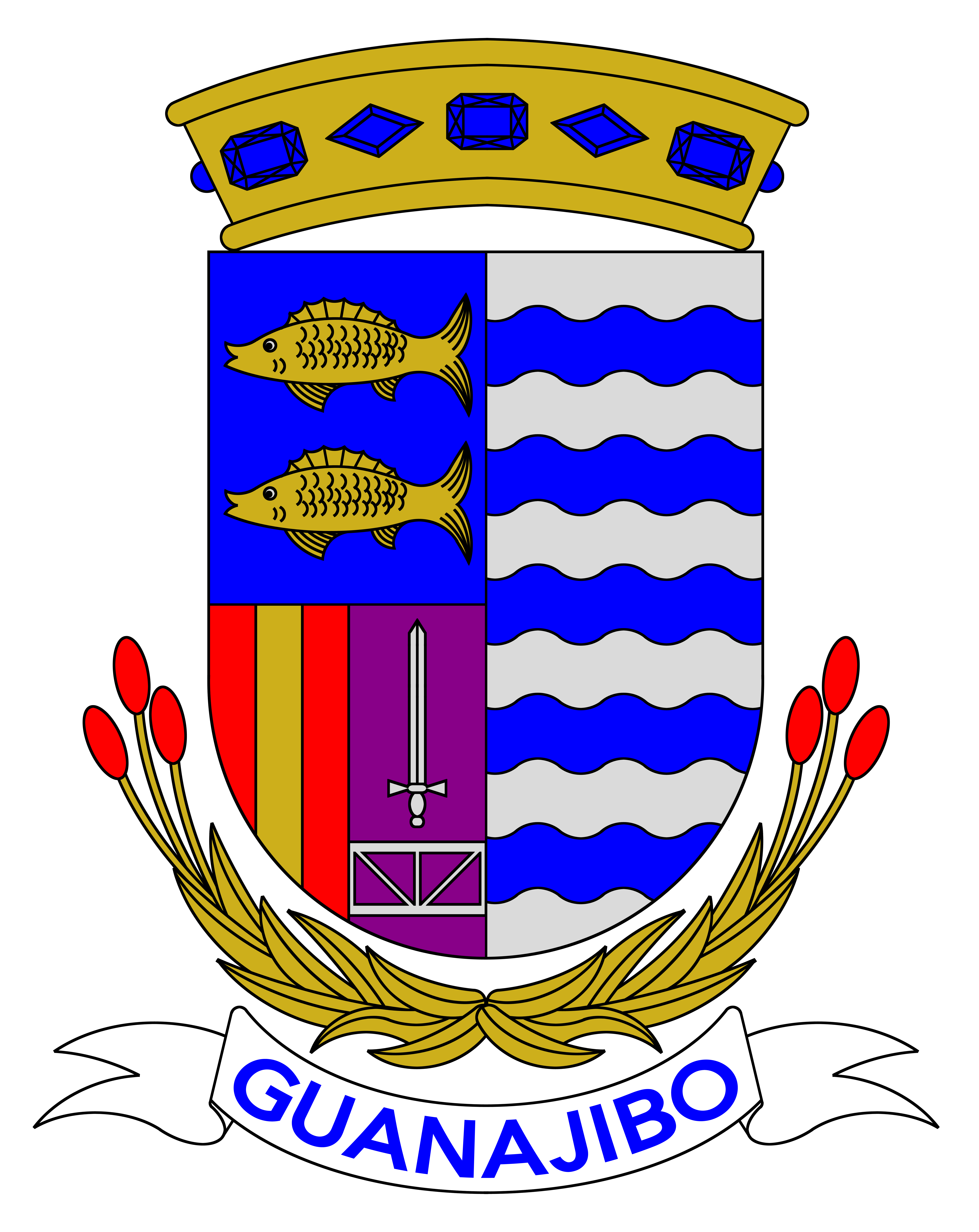 Escudo del Barrio Guanajibo